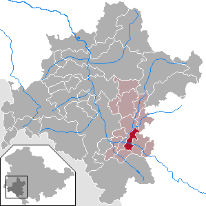 Belrieth in Thuringia - District Schmalkalden-Meiningen